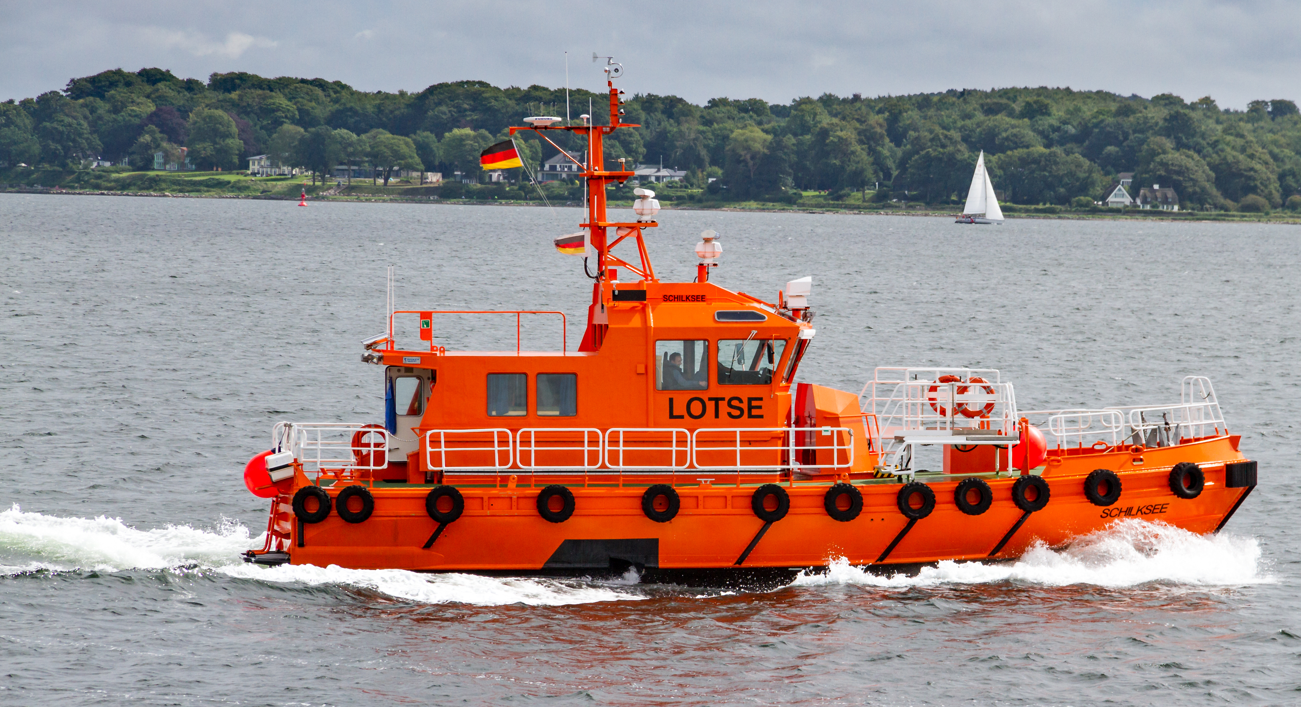 Lotsenboot "Schilksee" in der Kieler Förde vor Holtenau